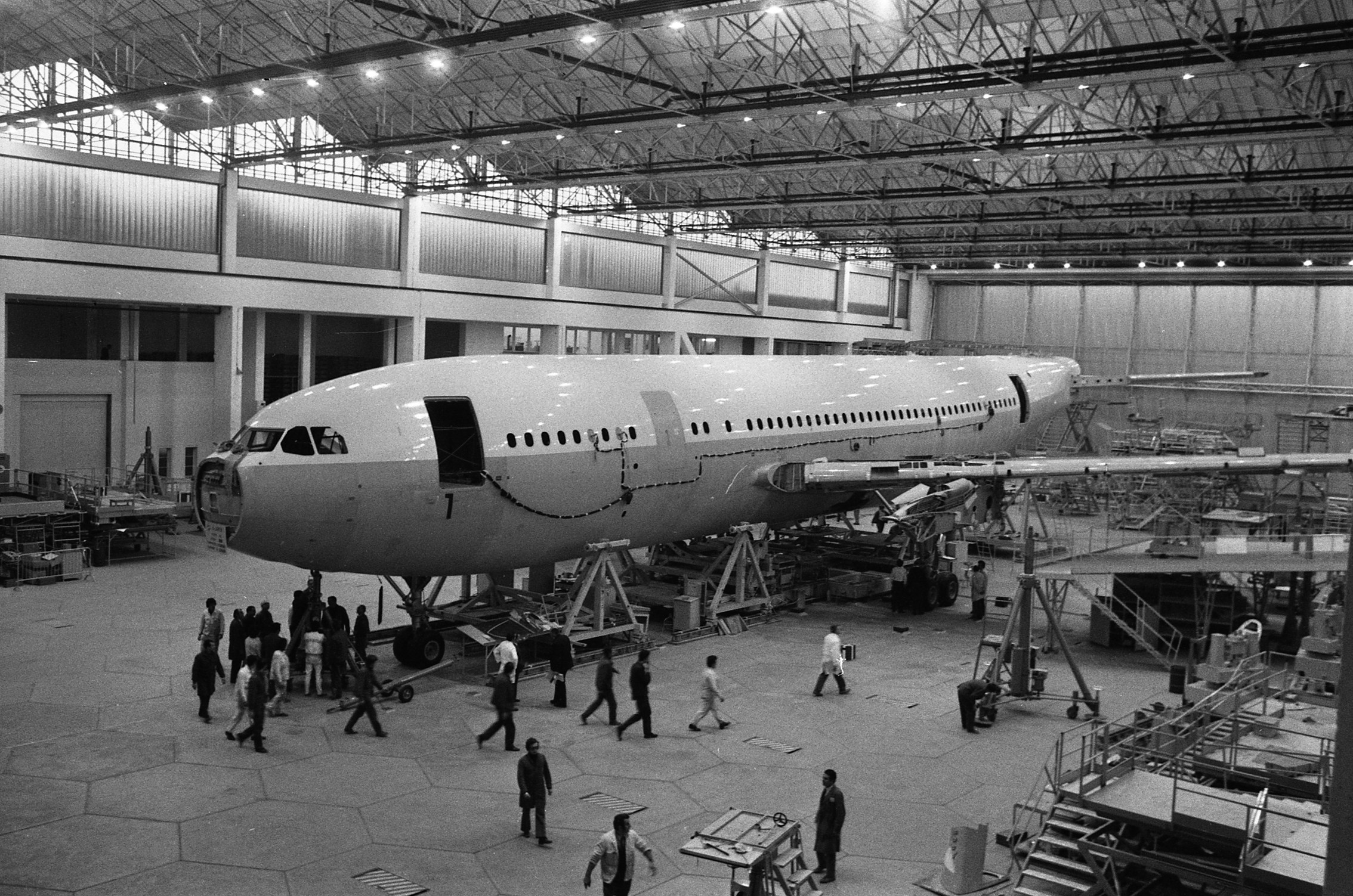 Usine de l'Aérospatiale de Saint-Martin-du-Touch, grand hall de montage. 5 février 1972. Vue d'ensemble de l'Airbus A300 B (vue de côté, partie avant de l'avion), cales en bois sous l'avion, échaffaudages ; techniciens autour de l'avion. Cliché pris lors du 1er déplacement tracté de l'avion encore en cours de montage.